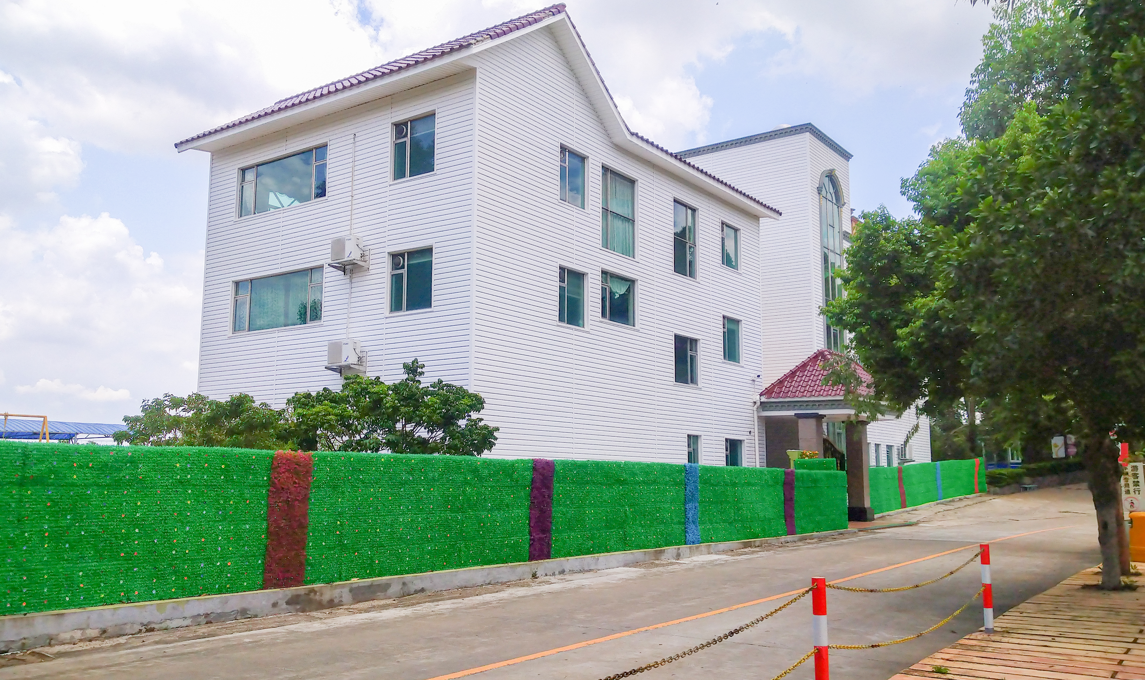 观音山周边别墅